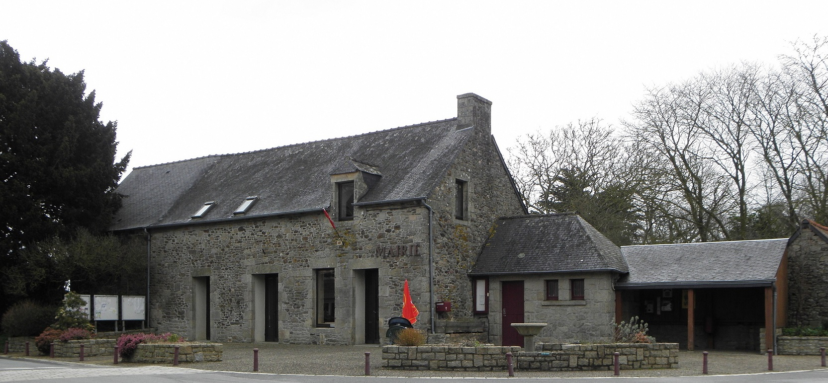 Mairie de saint-Maudez (22).